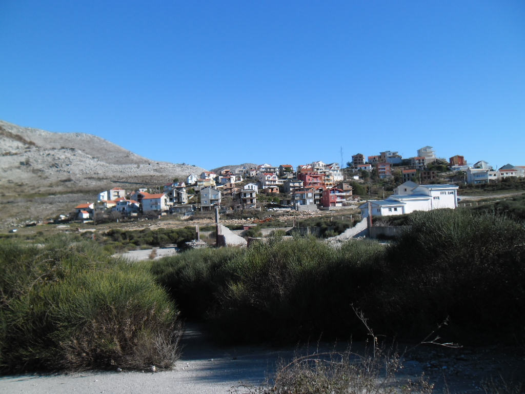 Ivanica